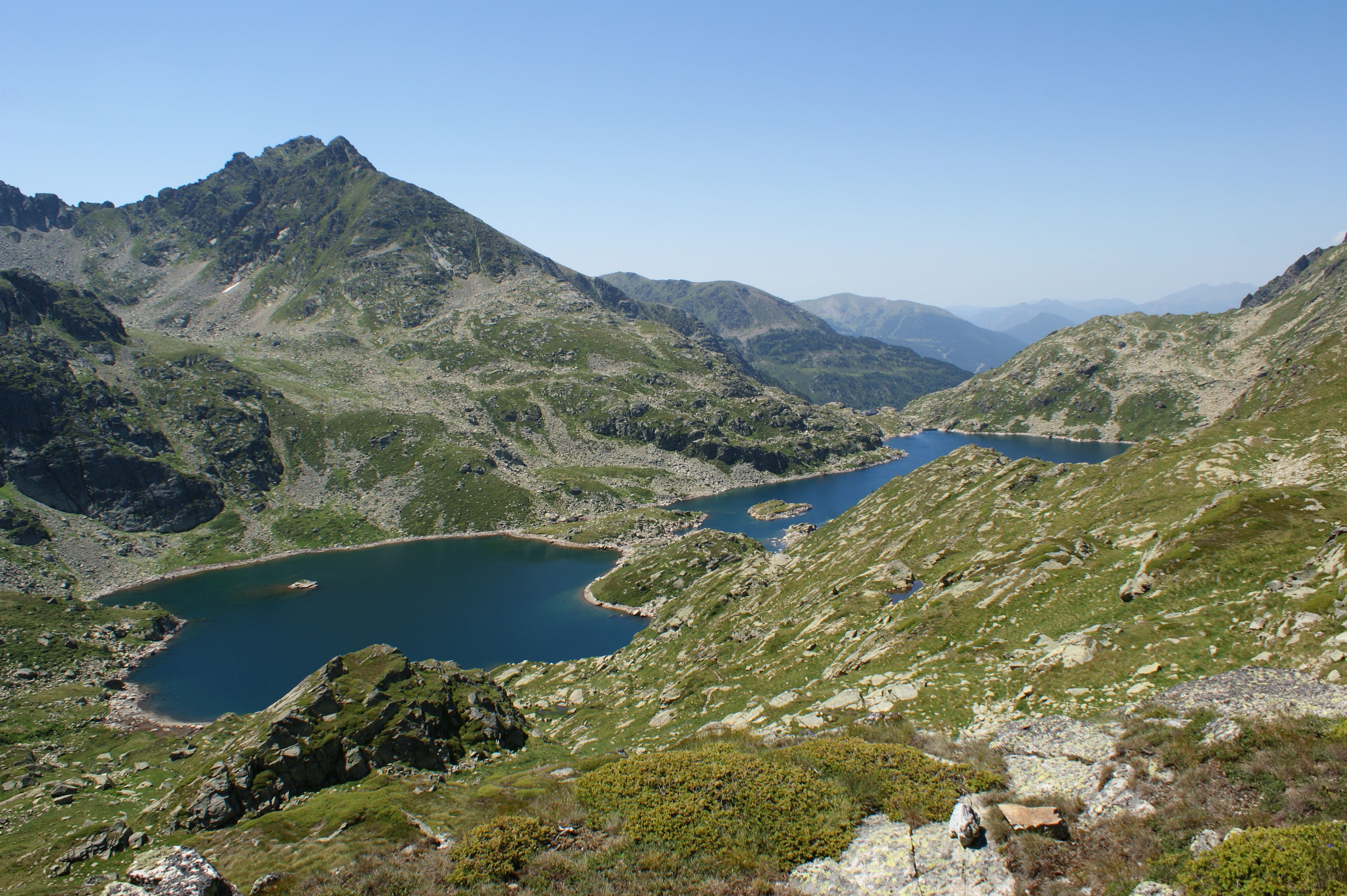 Estany Segon de Juclar This is a a photo of a lake or pond in Andorra with id: IEA-BE-41